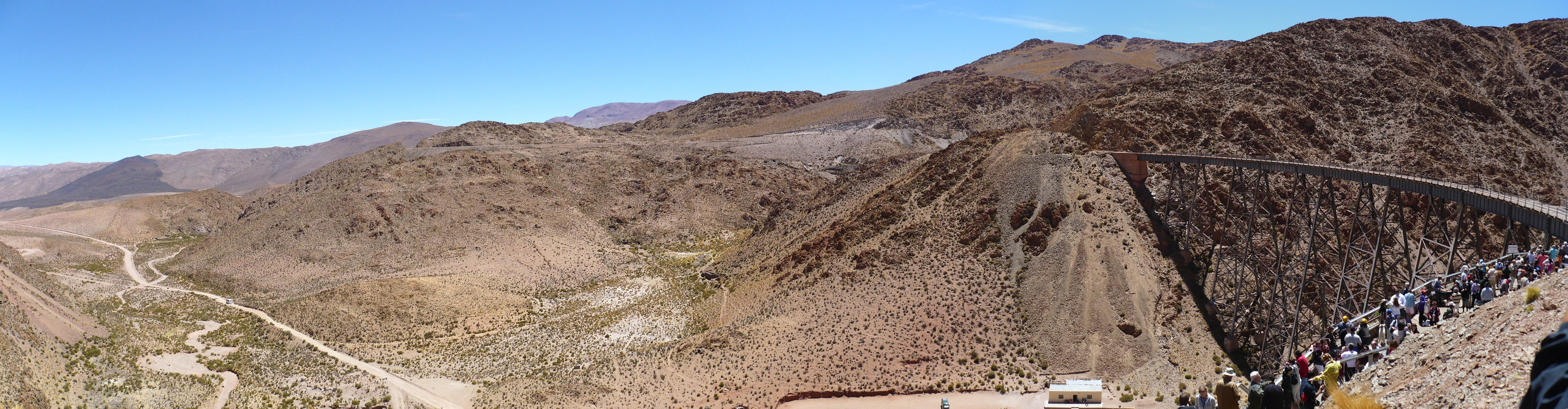 Panorámica desde el mirador en el viaducto de la Polvorilla, etapa final del viaje que hace el tren a las nubes